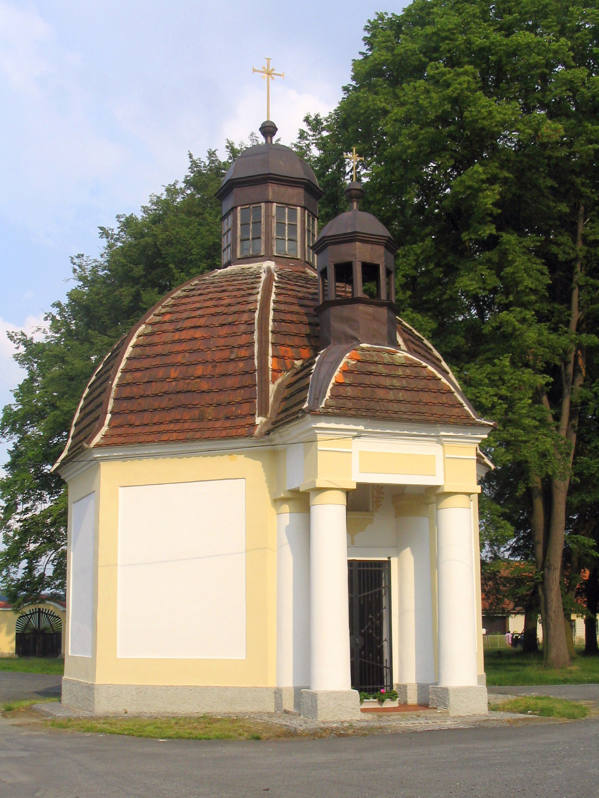 Kaple Povýšení svatého Kříže v Soběkurech.